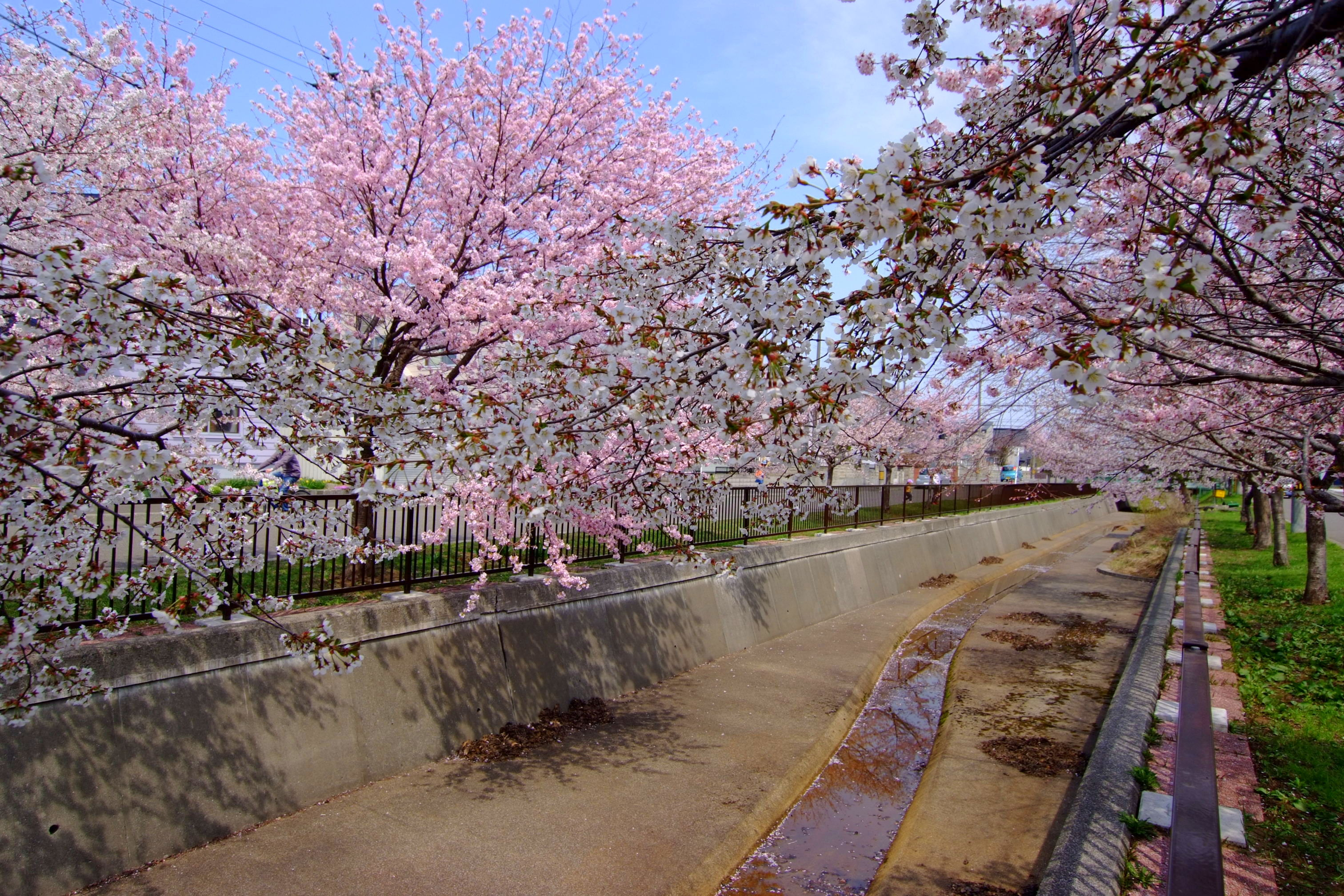 旧軽川 (Old Garu River)